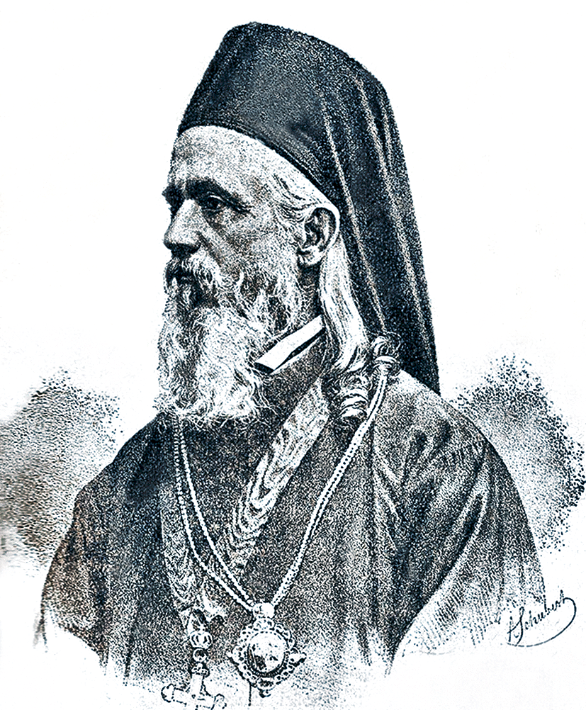 Metropolit Sylvester Morariu-Andriewicz nach 1880